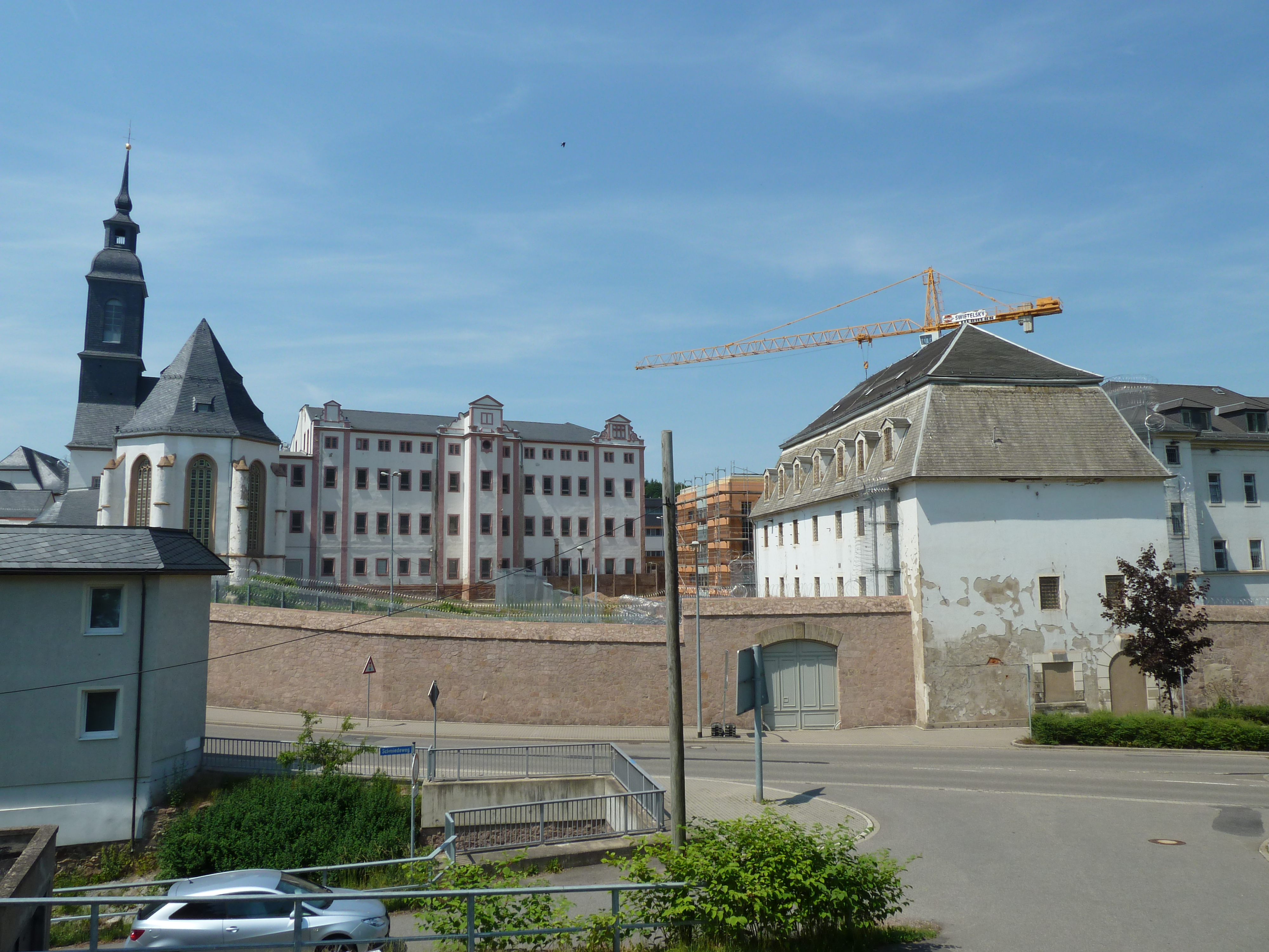 JVA Waldheim